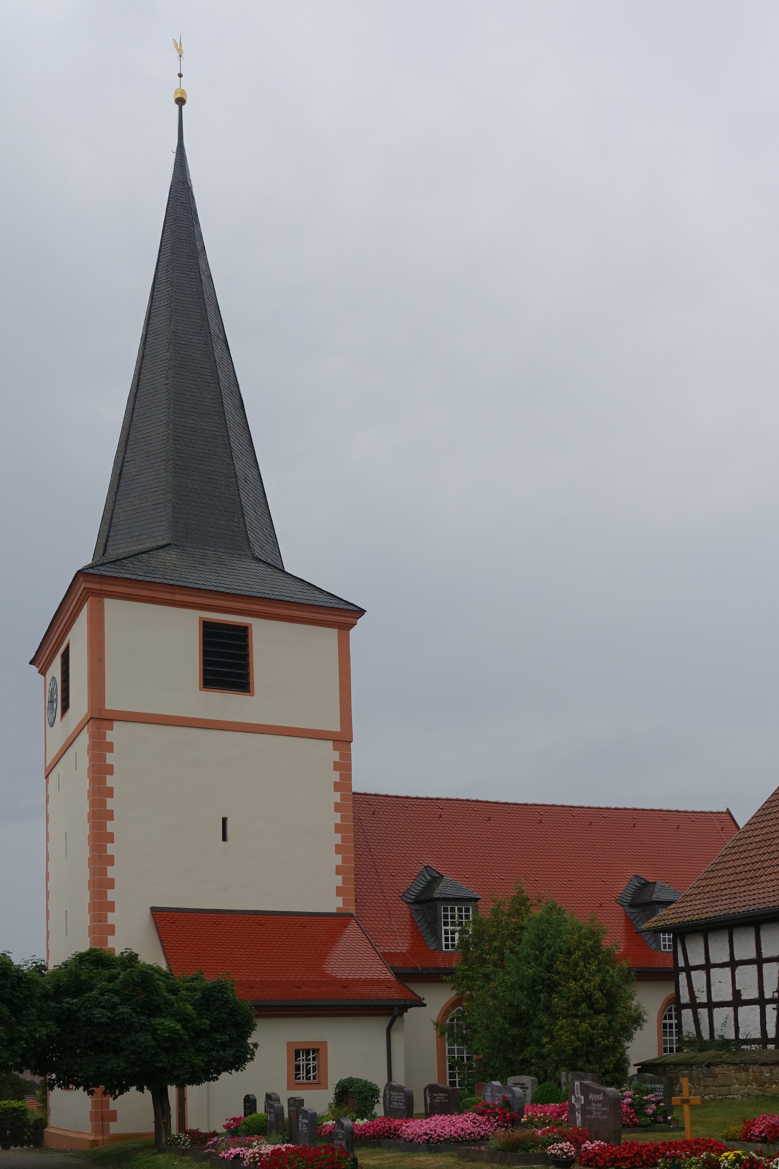 Blick auf die Kirche